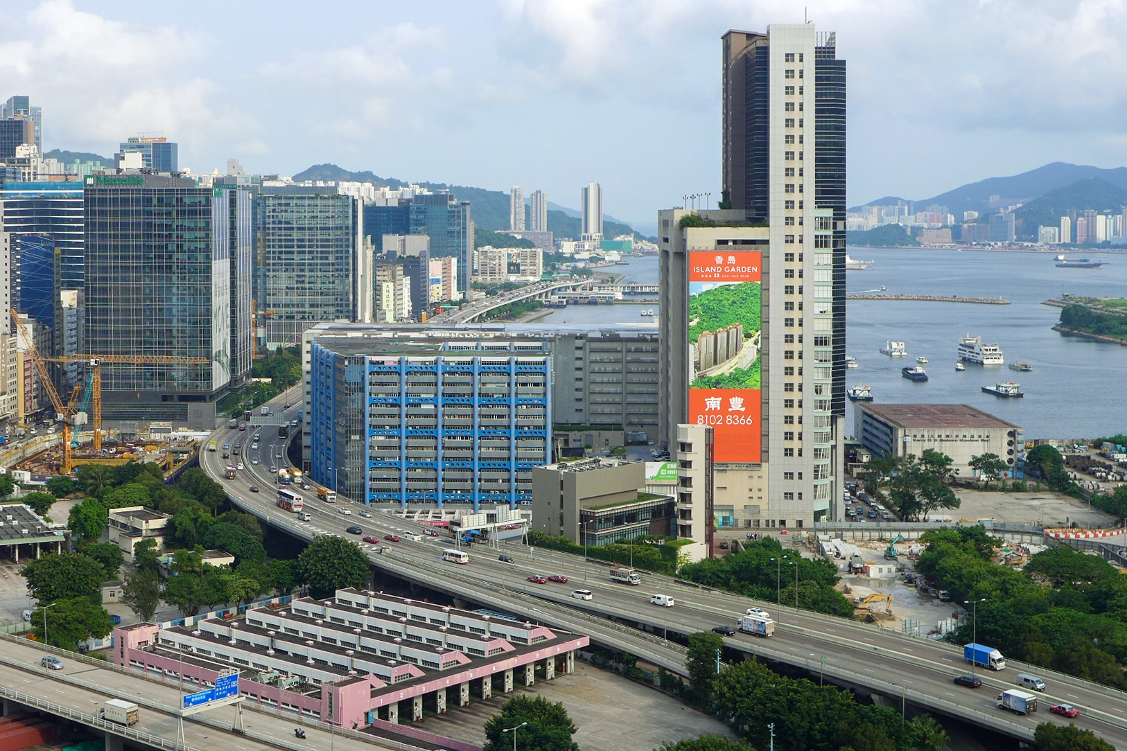 Kwun Tong Bypass